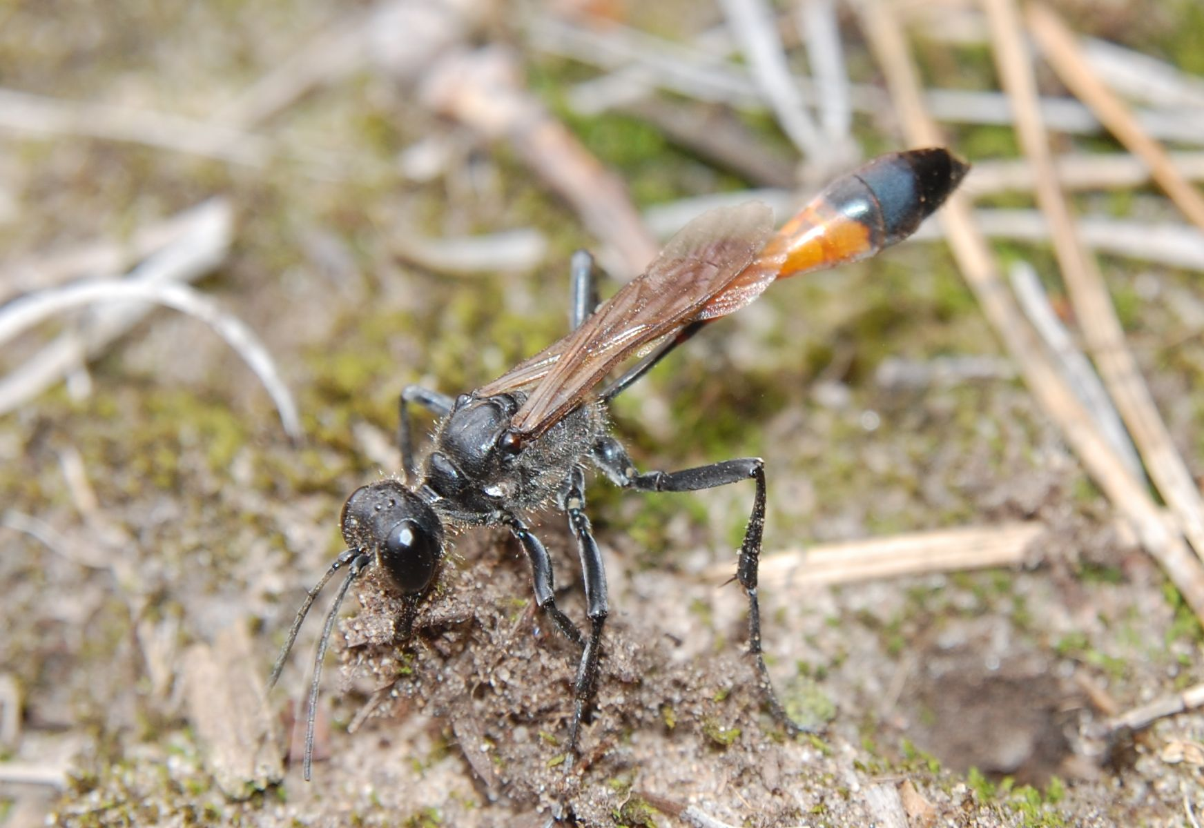 Wegwespe zur Bestimmung